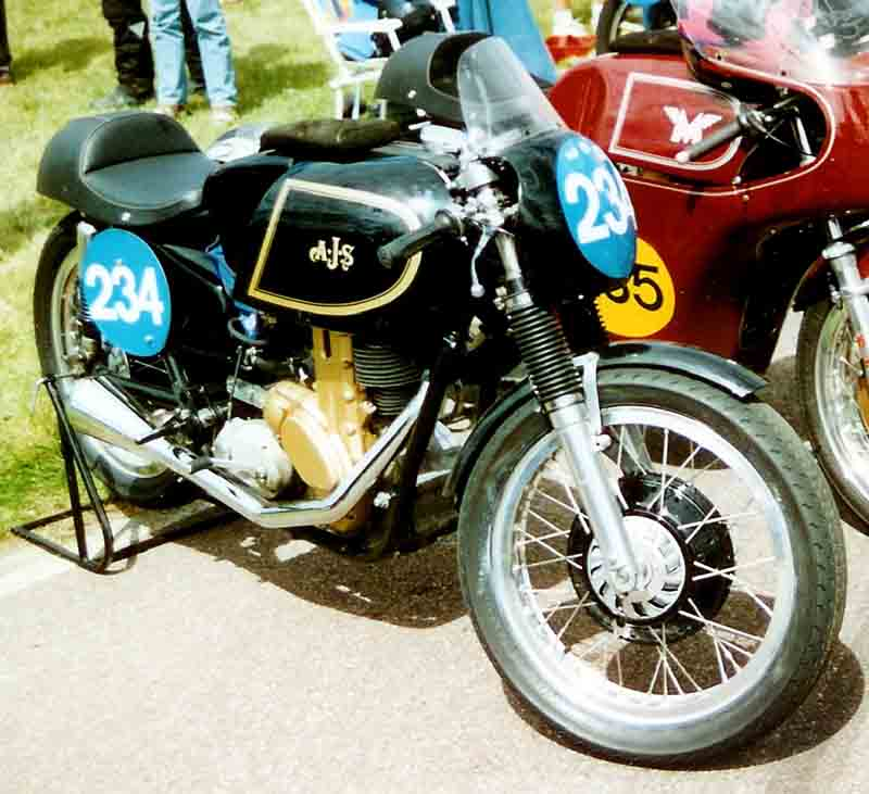 AJS